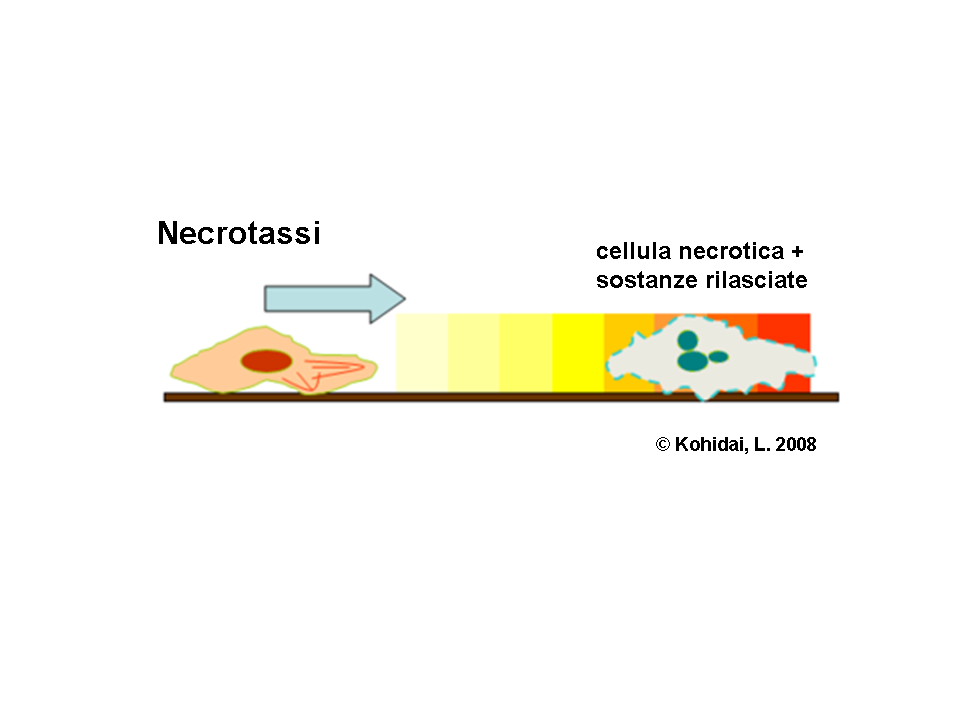 Necrotassi